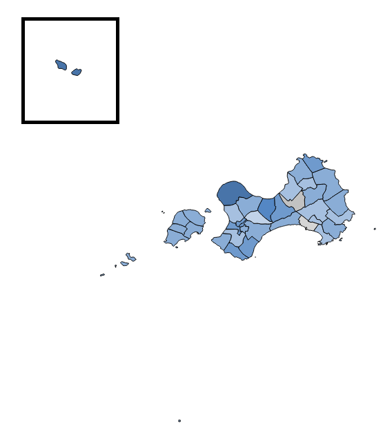 中文（台灣）: 灰色村里為陳福海領先的村里 顏色對照表